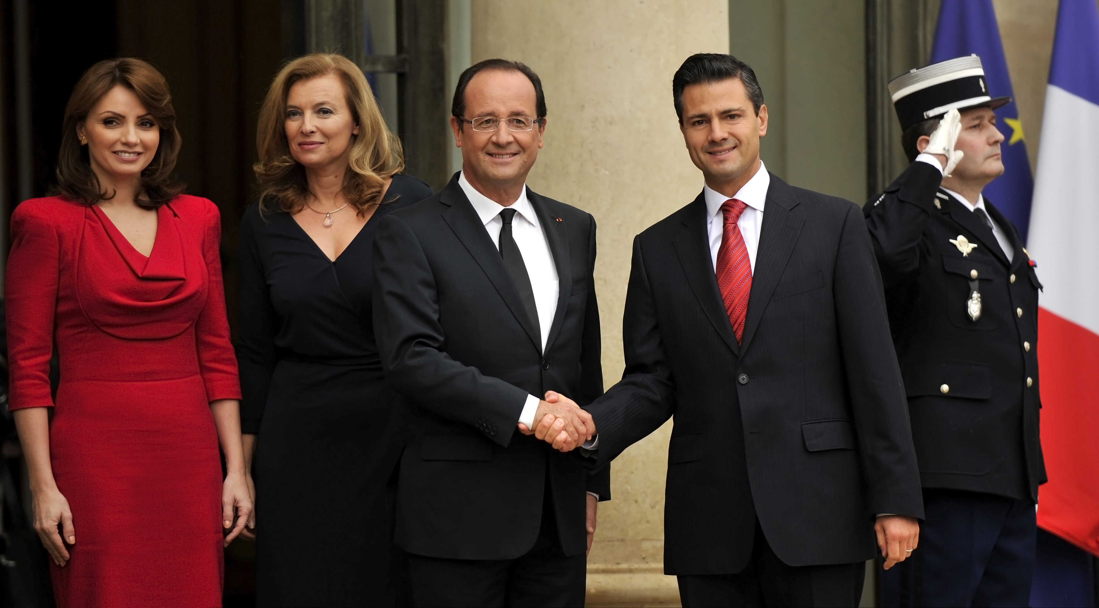 Comida con el Presidente de la República Francesa, François Hollande. Paris, Francia. 17 de Octubre del 2012.